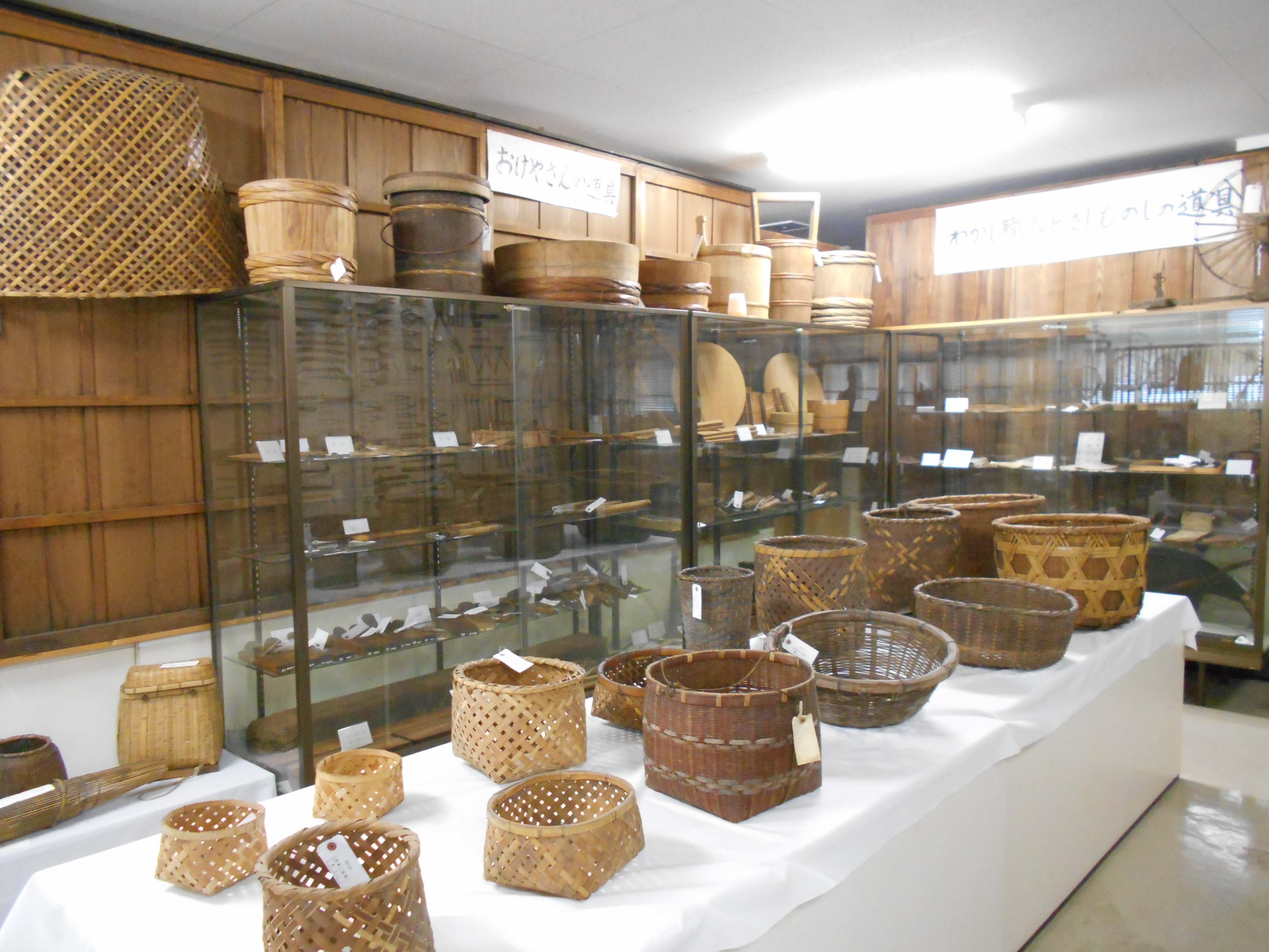 岩倉市図書館。民俗資料を展示する3階の郷土資料室。